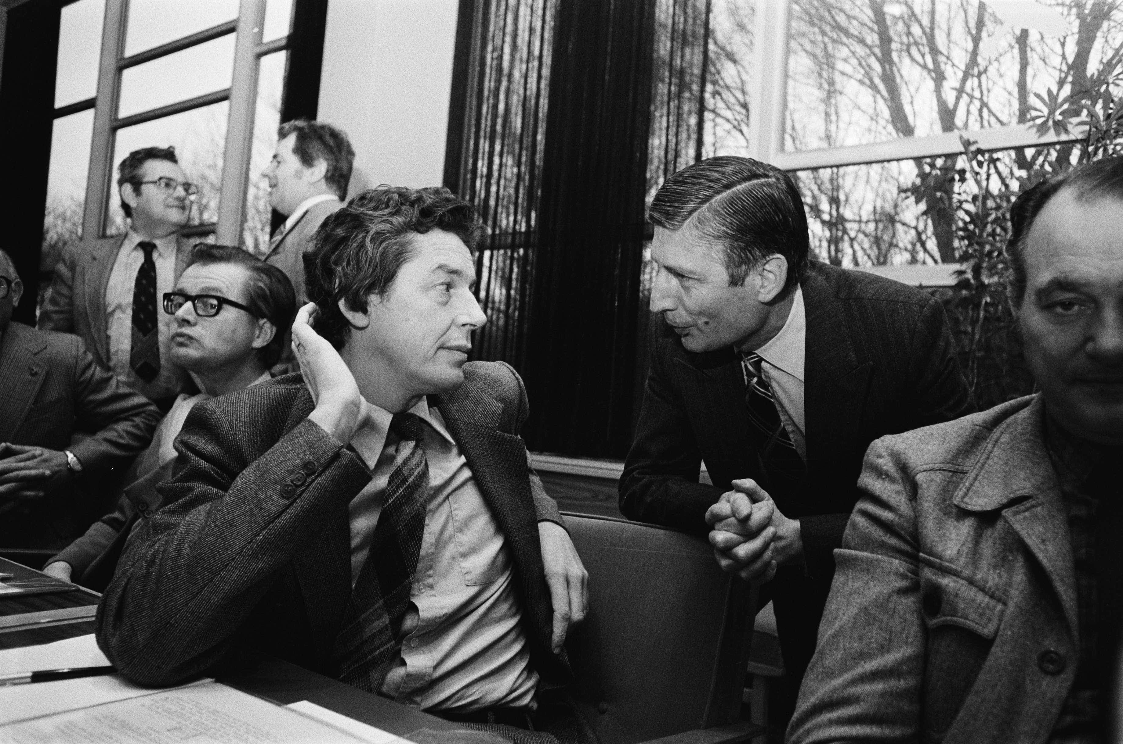 Collectie / Archief : Fotocollectie Anefo Reportage / Serie : Overleg tussen regering, vakbonden en werkgevers over het arbeidsvoorwaardenbeleid voor 1980 in het gebouw van de Sociaal Economische Raad Beschrijving : FNV voorzitter Kok in gesprek met premier Van Agt in het gebouw van de Sociaal Economische Raad (SER) Datum : 20 december 1979 Locatie : Den Haag, Zuid-Holland Trefwoorden : arbeidsvoorwaarden, ministers-presidenten, vakbonden, vergaderingen, voorzitters Persoonsnaam : Agt, Dries van, Kok, Wim Fotograaf : Bogaerts, Rob / Anefo, [onbekend] Auteursrechthebbende : Nationaal Archief Materiaalsoort : Negatief (zwart/wit) Nummer archiefinventaris : bekijk toegang 2.24.01.05 Bestanddeelnummer : 930-5965